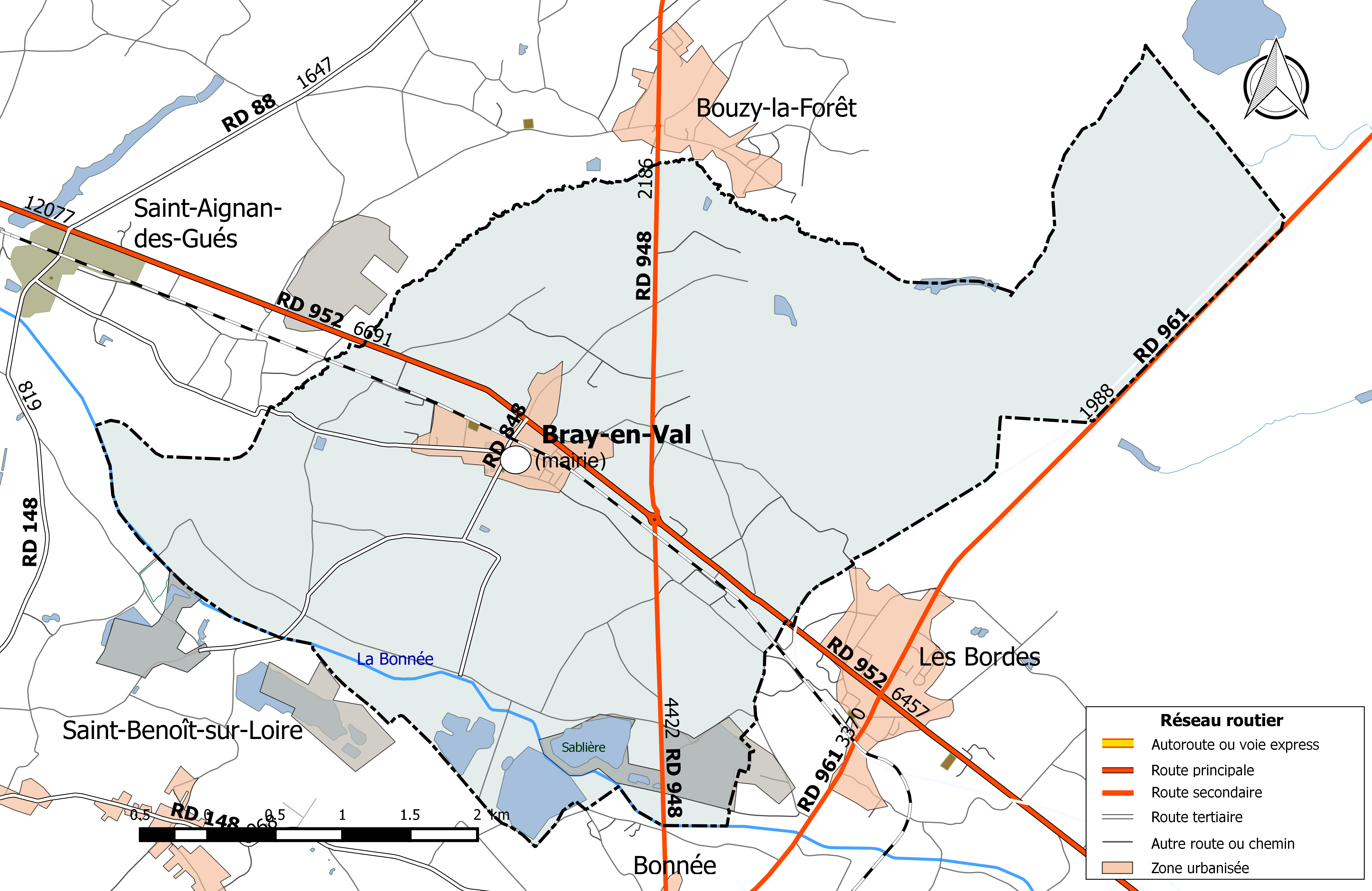 Carte du réseau routier de la commune de Bray-en-Val.